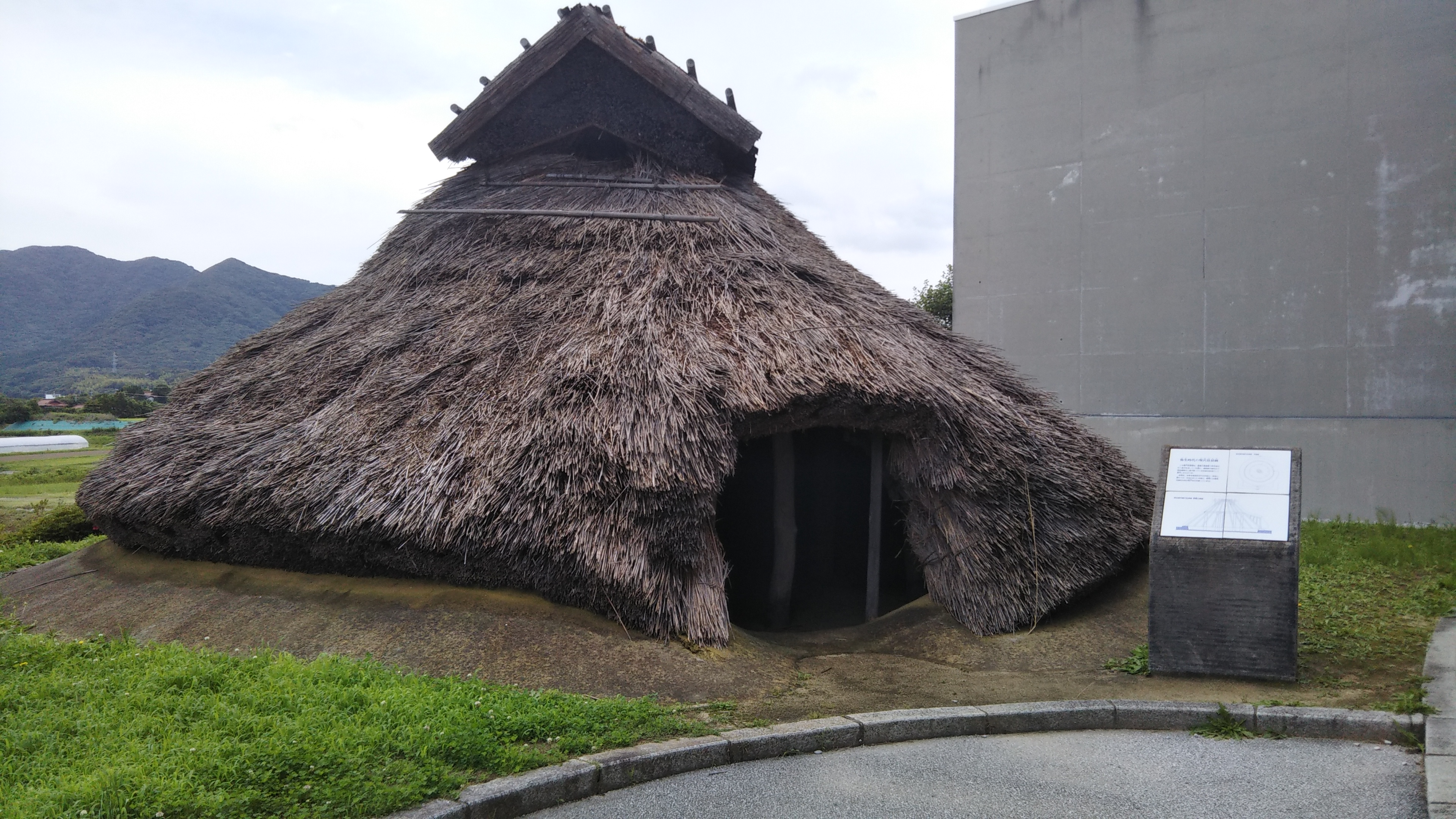 山口県下関市大字綾羅木下関市立考古博物館にある弥生時代の竪穴住居復元物